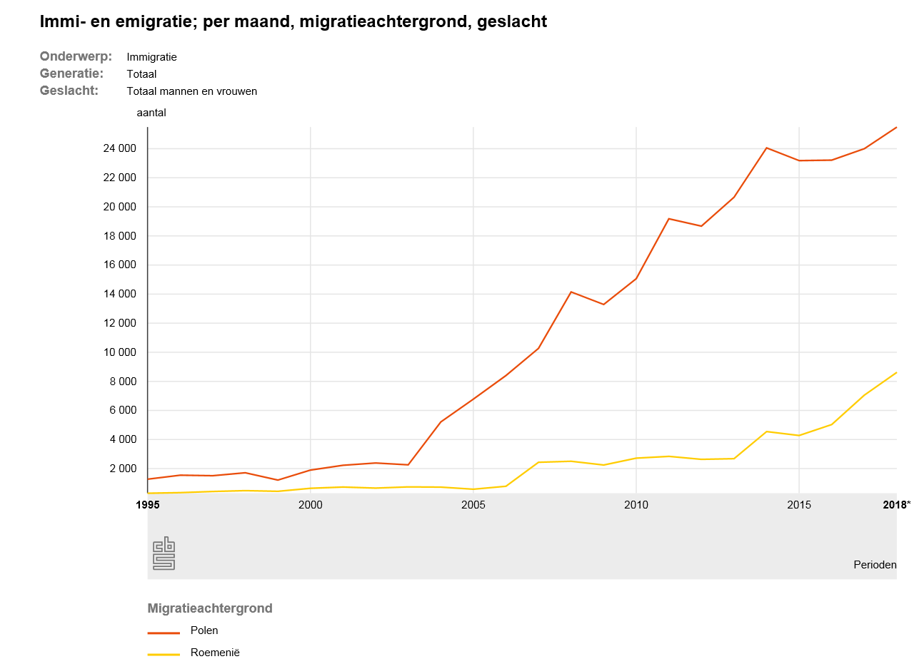 Immi- en emigratie van Polen en Roemenen